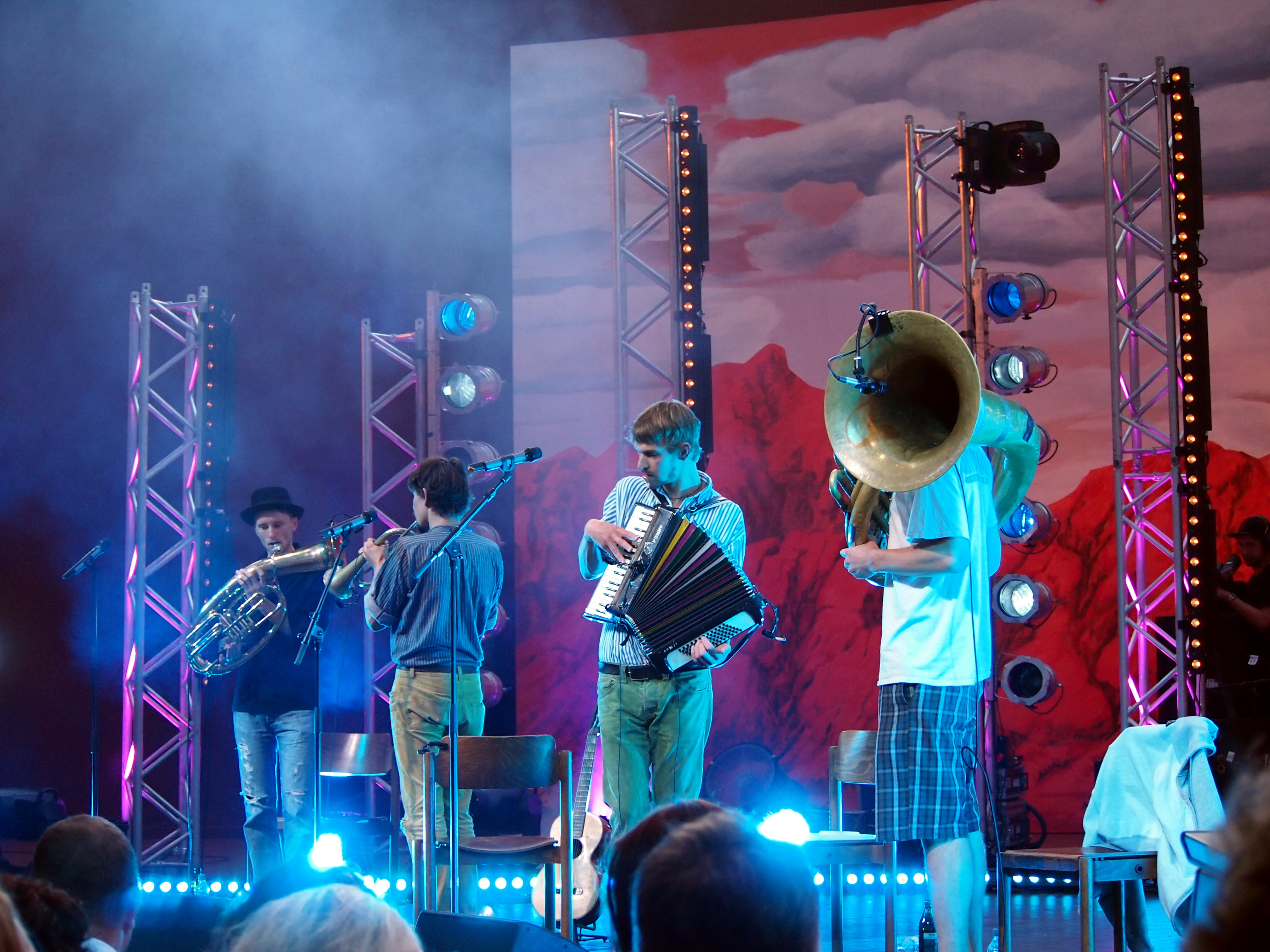 Heimatsound-Festival 2014 in Oberammergau, Kofelgschroa Festivalsommer This photo was created with the support of donations to Wikimedia Deutschland in the context of the CPB project "Festival Summer". This file is made available under the Creative Commons CC0 1.0 Universal Public Domain Dedication. The person who associated a work with this deed has dedicated the work to the public domain by waiving all of their rights to the work worldwide under copyright law, including all related and neighboring rights, to the extent allowed by law. You can copy, modify, distribute and perform the work, even for commercial purposes, all without asking permission. Personality rights warningAlthough this work is freely licensed or in the public domain, the person(s) shown may have rights that legally restrict certain re-uses unless those depicted consent to such uses. In these cases, a model release or other evidence of consent could protect you from infringement claims.